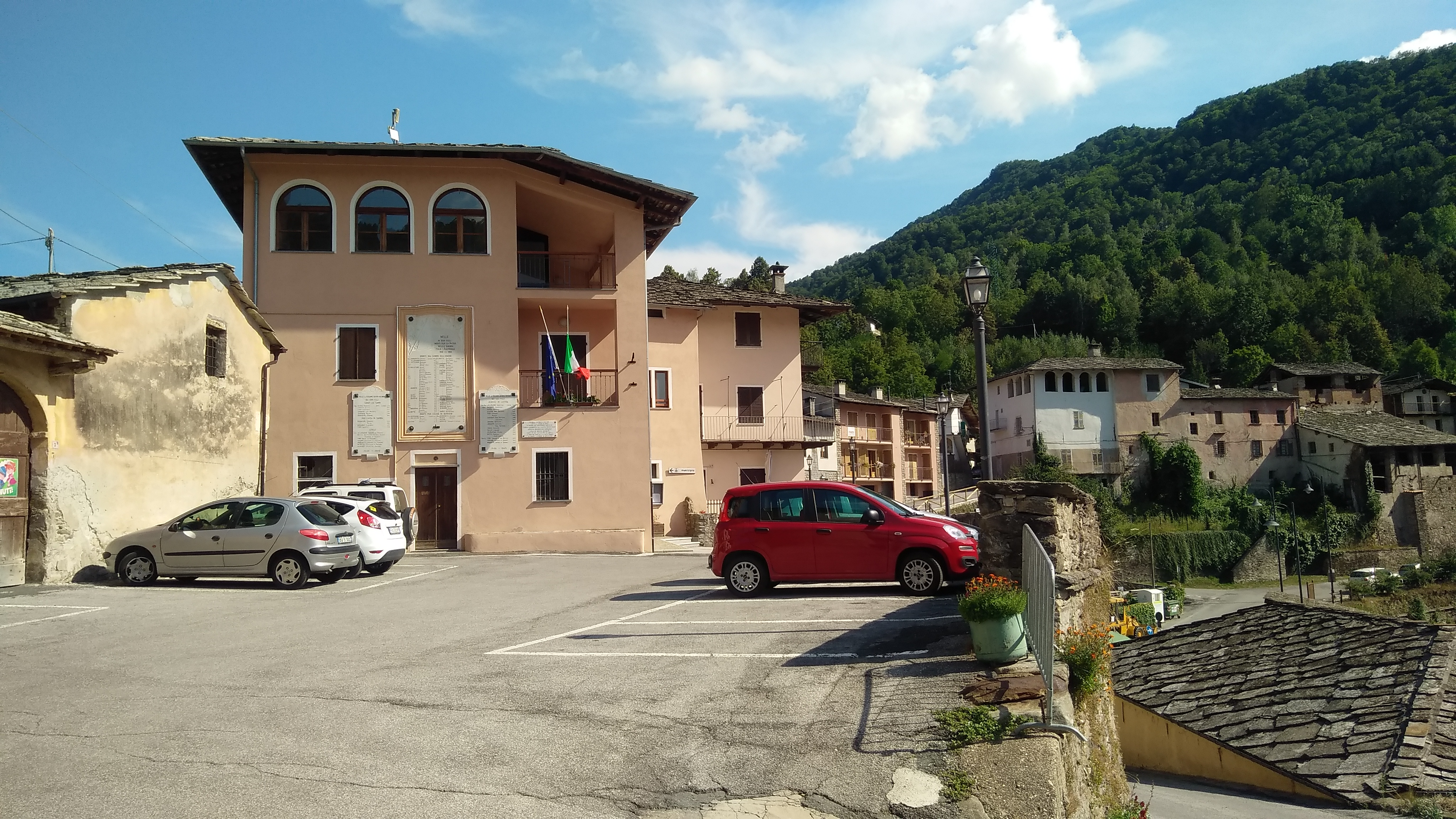 Melle (provincia di Cuneo): il municipio